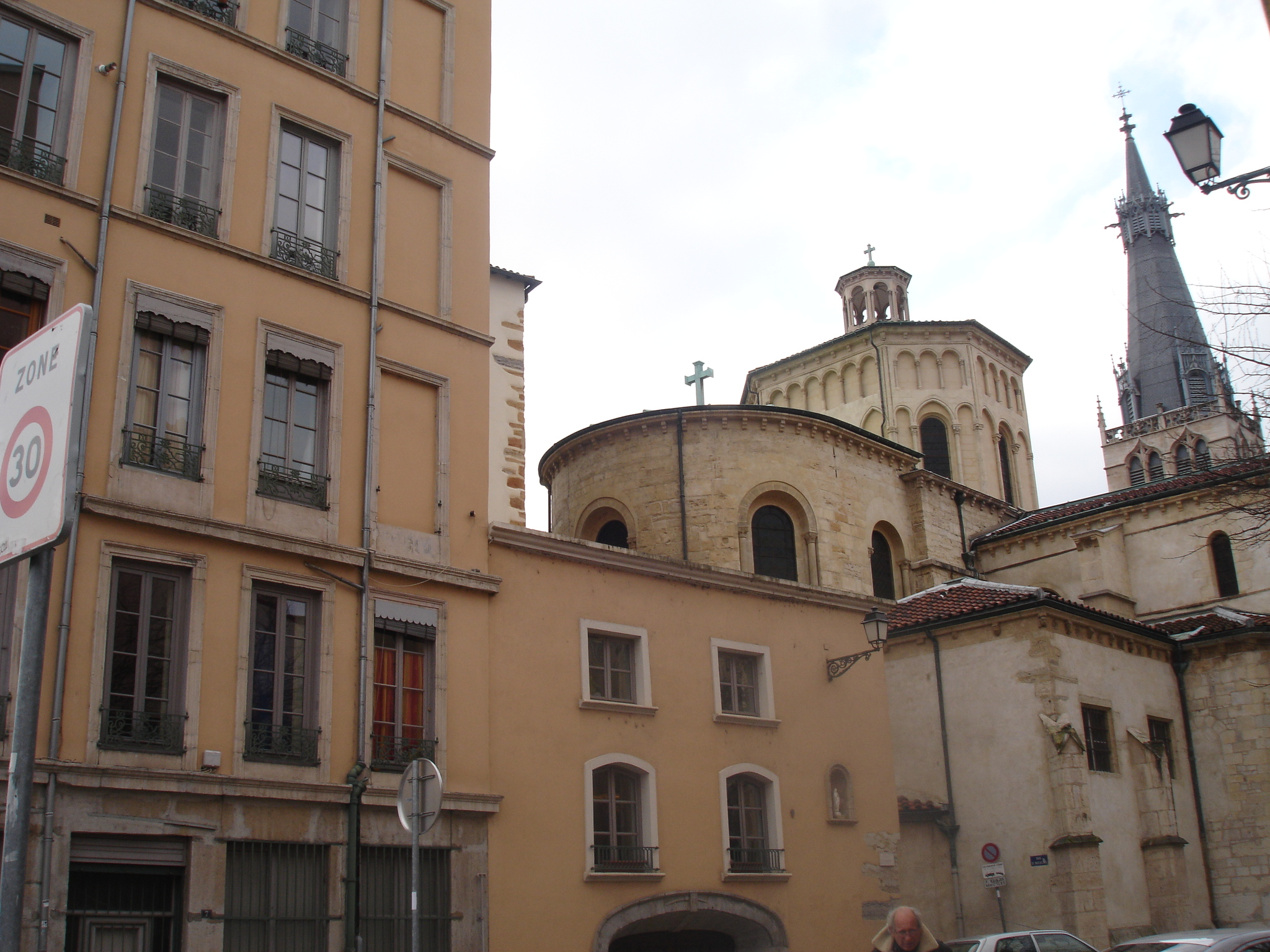 Lyon Saint-Paul vu du quai de Saône